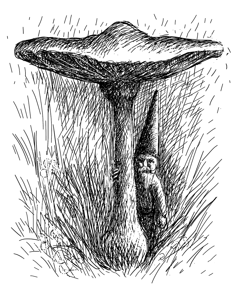 'Nisse (gnome)'. Un gnome, tel que je l'ai vu dans mon jardin. Il m'a laissé quelques secondes pour le dessiner (vous me croyez ?).